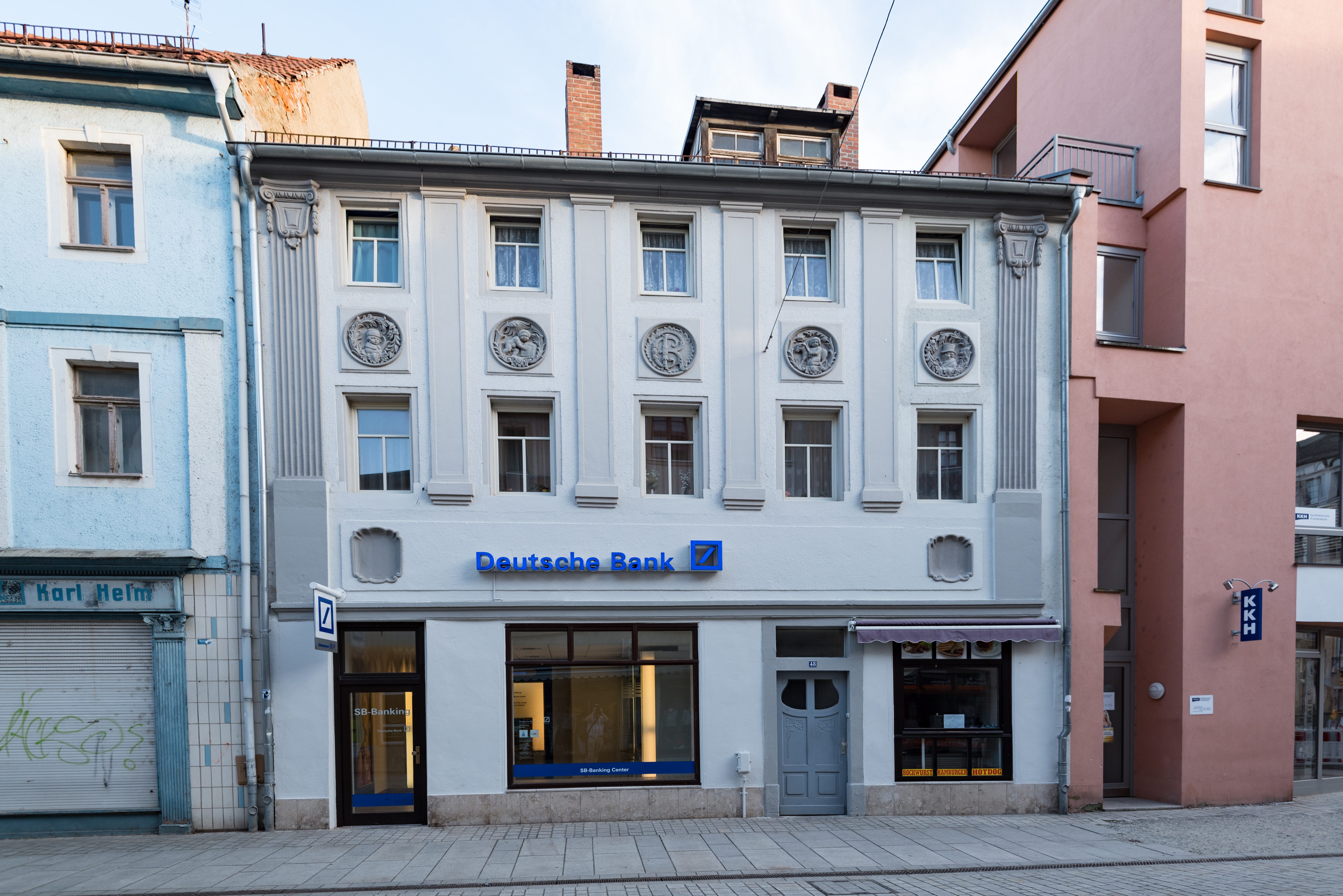 Weißenfels, Jüdenstraße 48